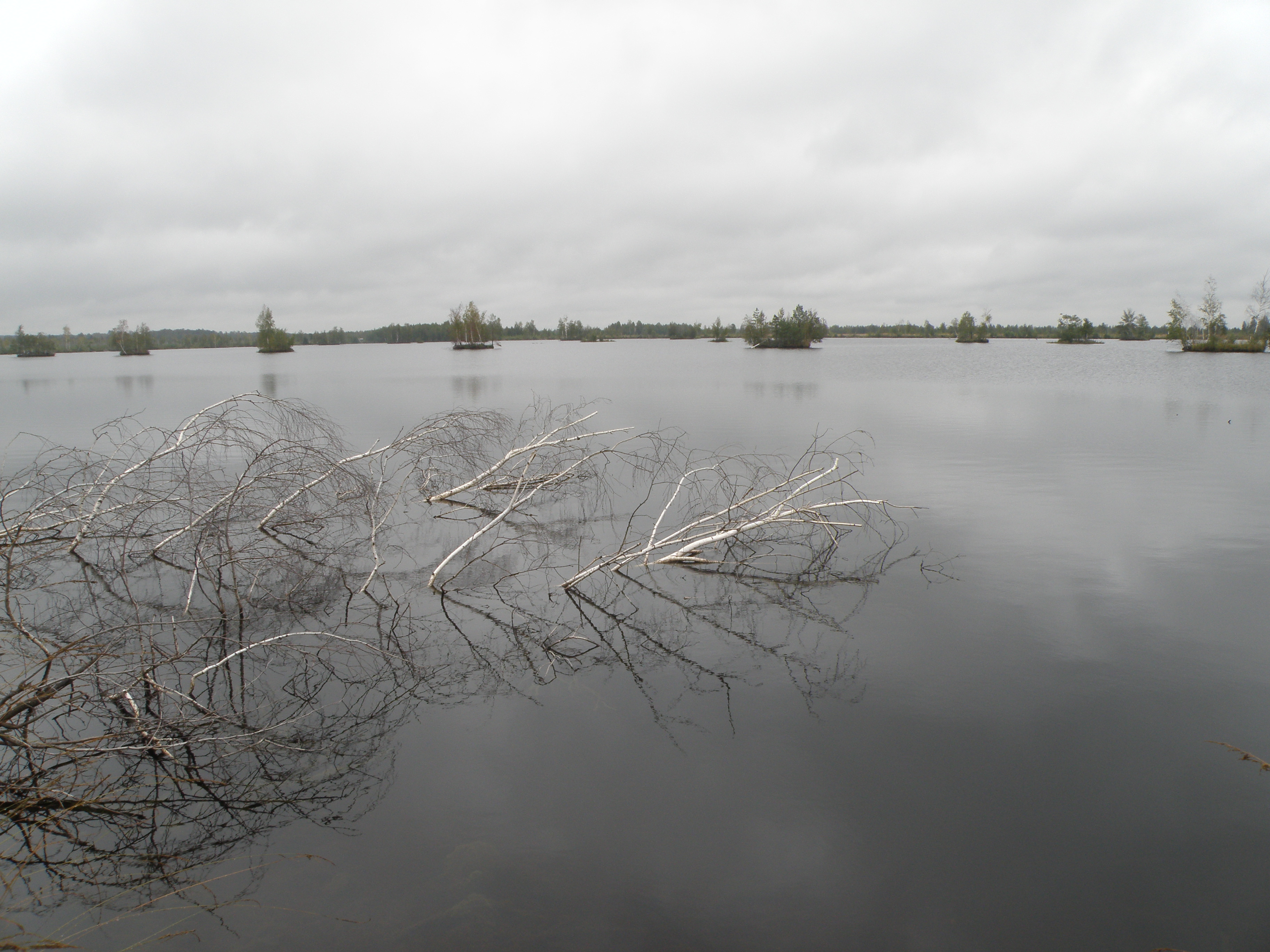 Торфокарьеры Гусевского торфопредприятия